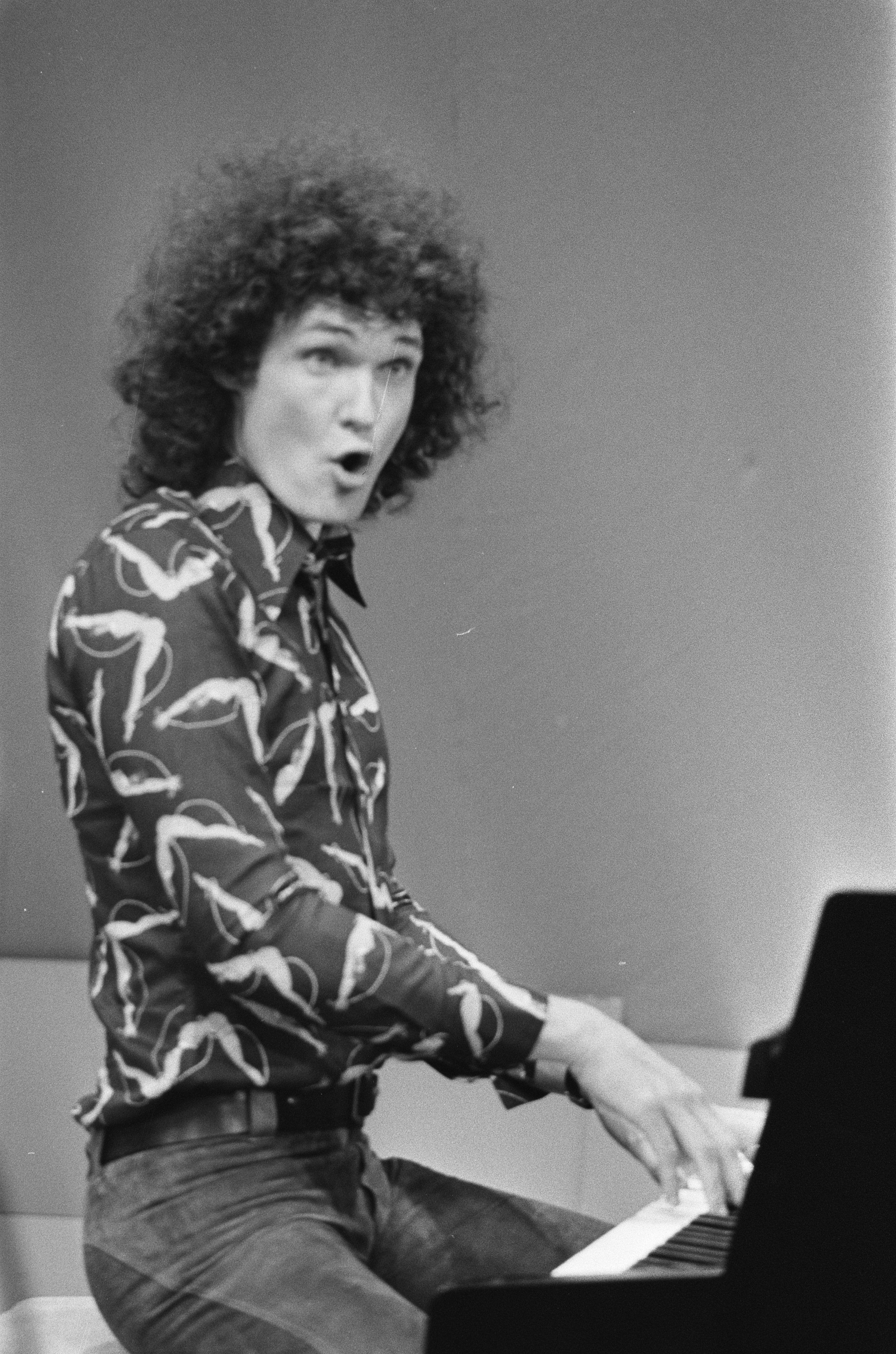 Michael Elo , Deense popzanger, N.a.v. het nummer "I loose the beat", geproduceerd door Hans van Hemert